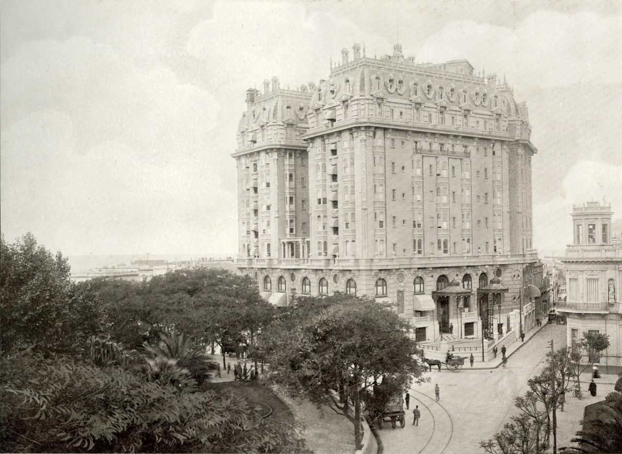 Vista del aspecto original del Plaza Hotel de Buenos Aires, como se lo inauguró en 1909. Ya en 1913 sufrió la primera reforma, cuando se construyó un acceso de carruajes en el espacio que se ve vacío, sobre la esquina. En 1933, una reforma hizo que perdiera mucha de su ornamentación. Buenos Aires, Argentina.